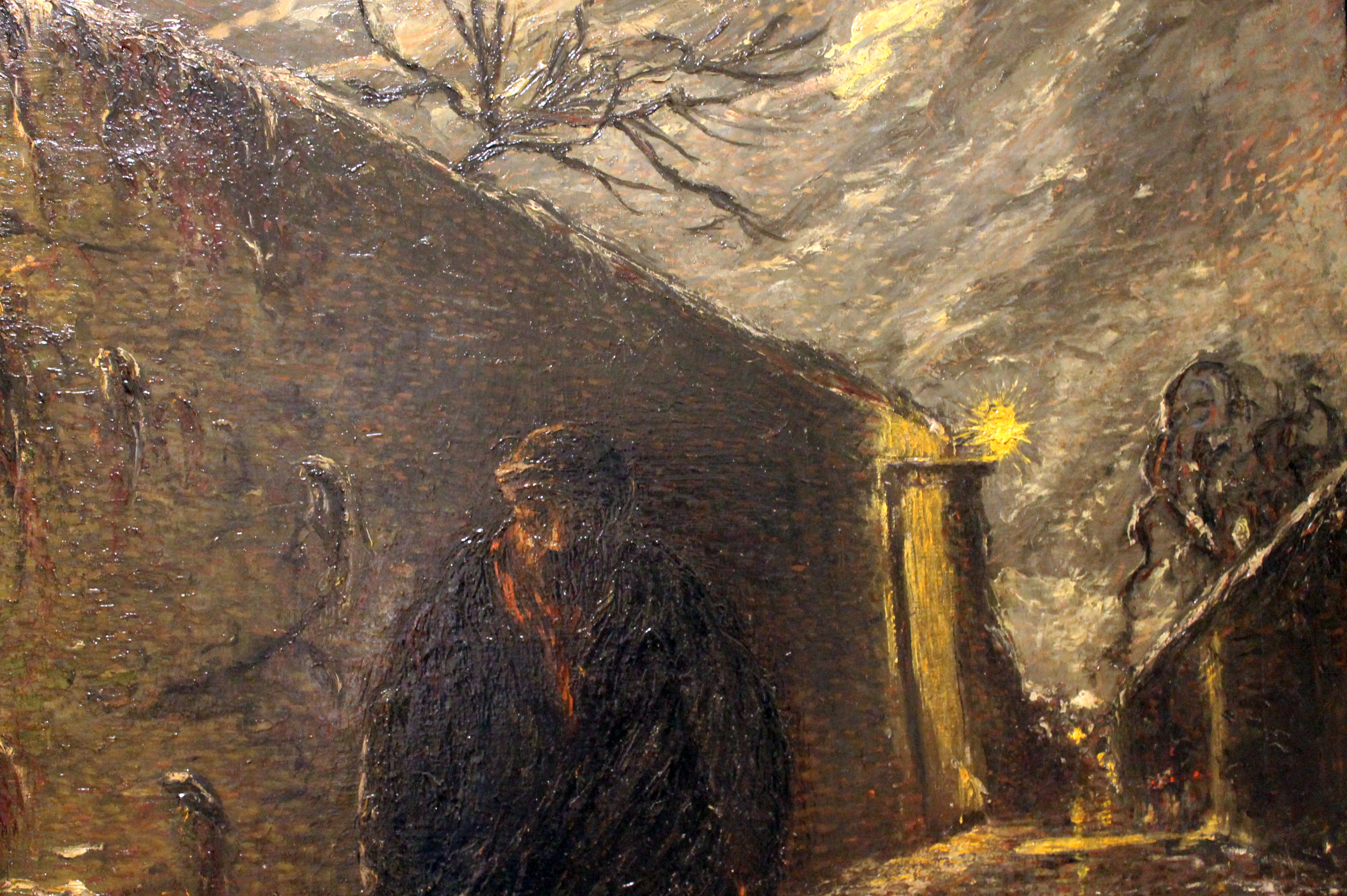 El anciano es un cuadro del pintor francés Léon Pourtau. Se encuentra en el Museo Soumaya, de la Ciudad de México, México.